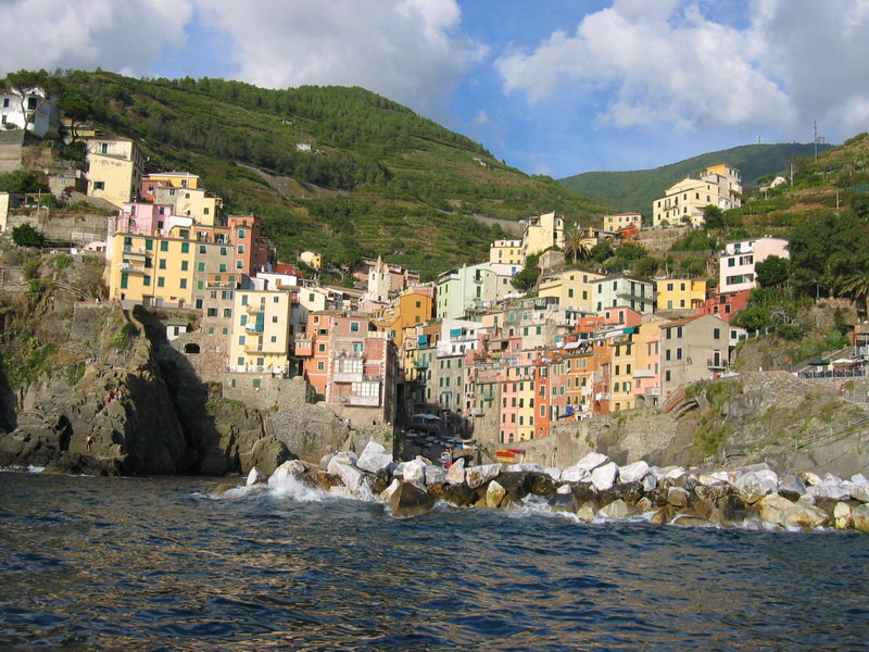 Cinque Terre, Italian Riviera